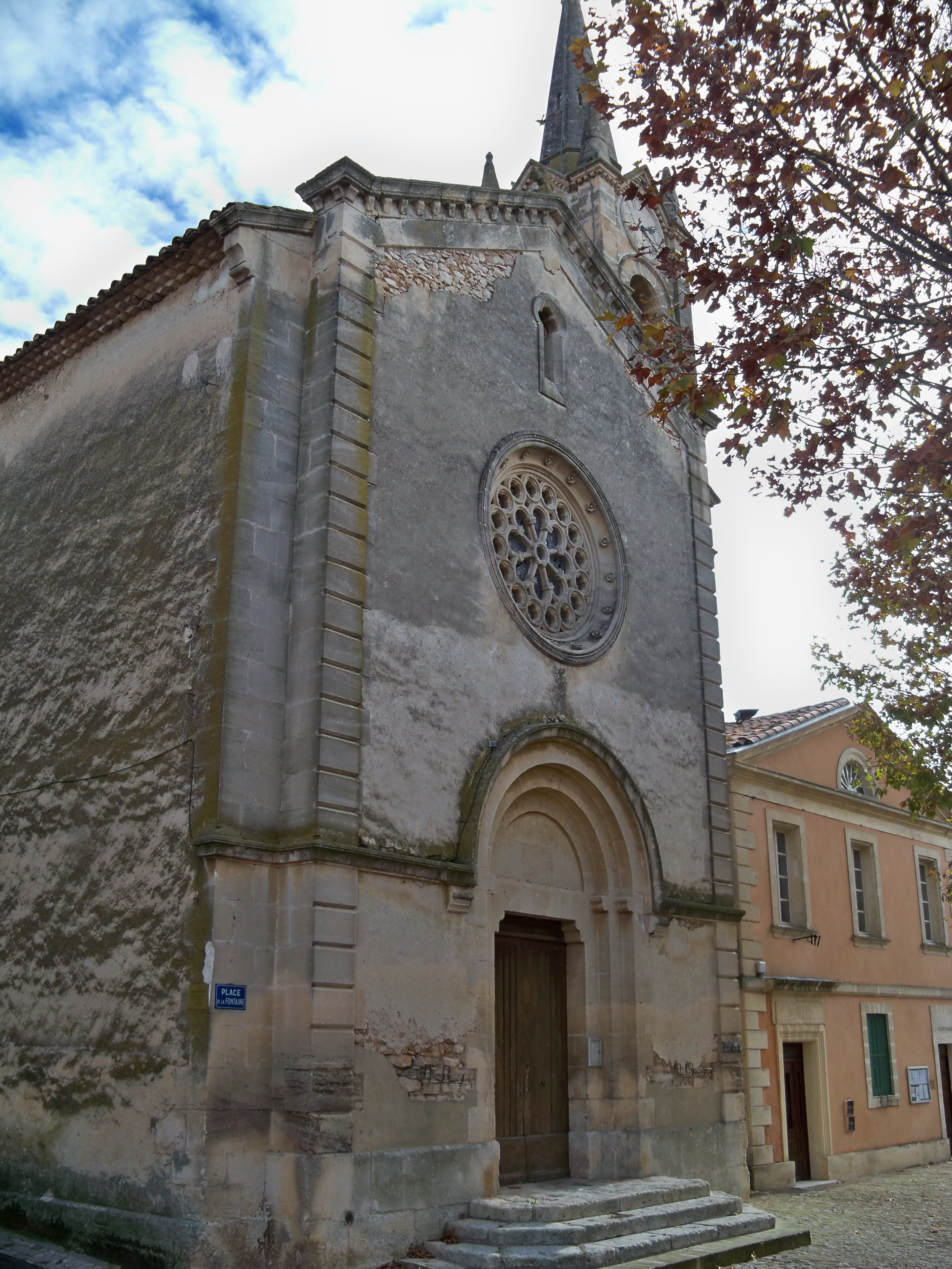 église de Villars, Vaucluse, France